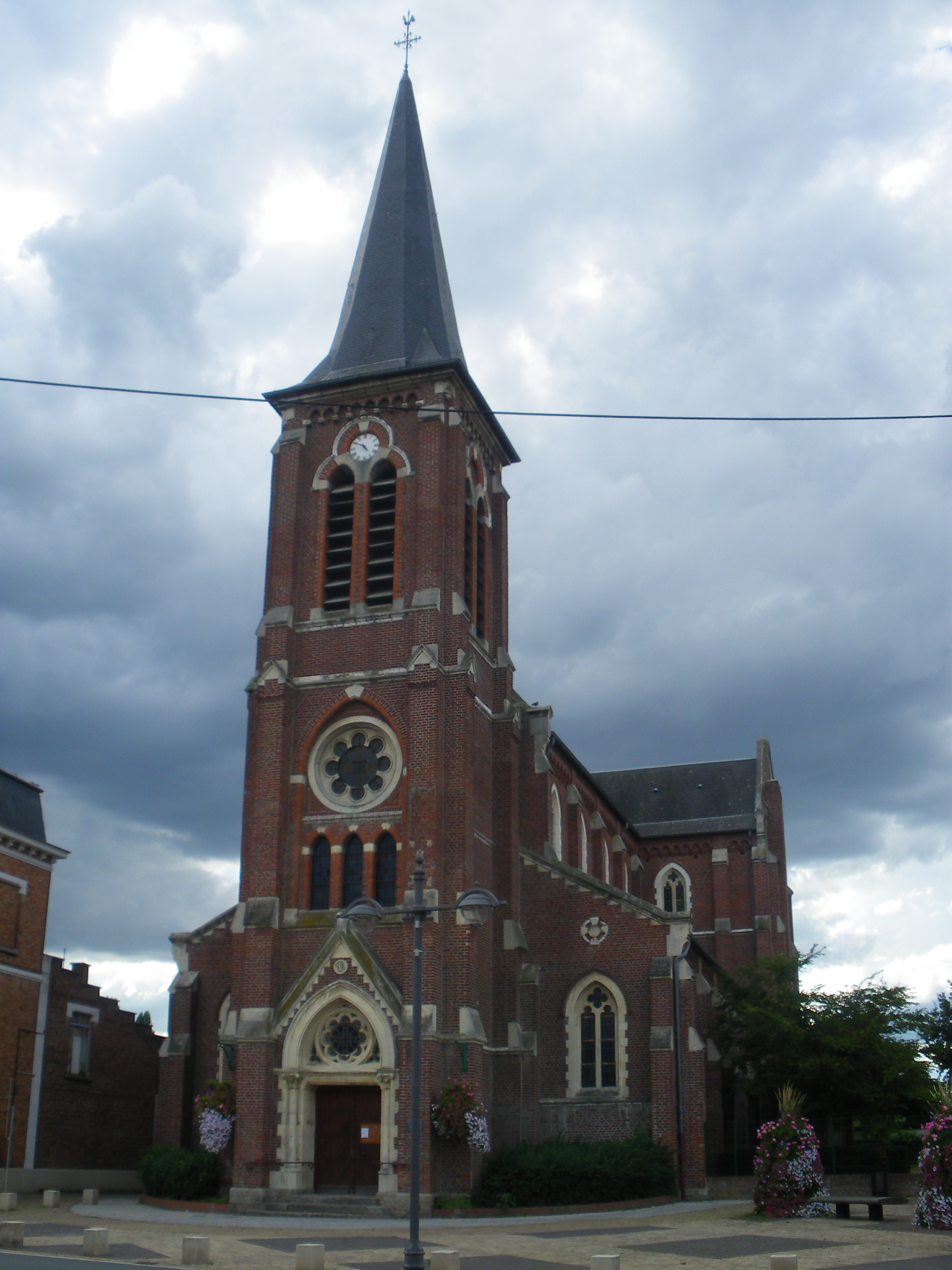 Vue de l'église de Libercourt.